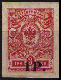 Фантастическо-спекулятивный выпуск от имени Новочеркасска, 1919